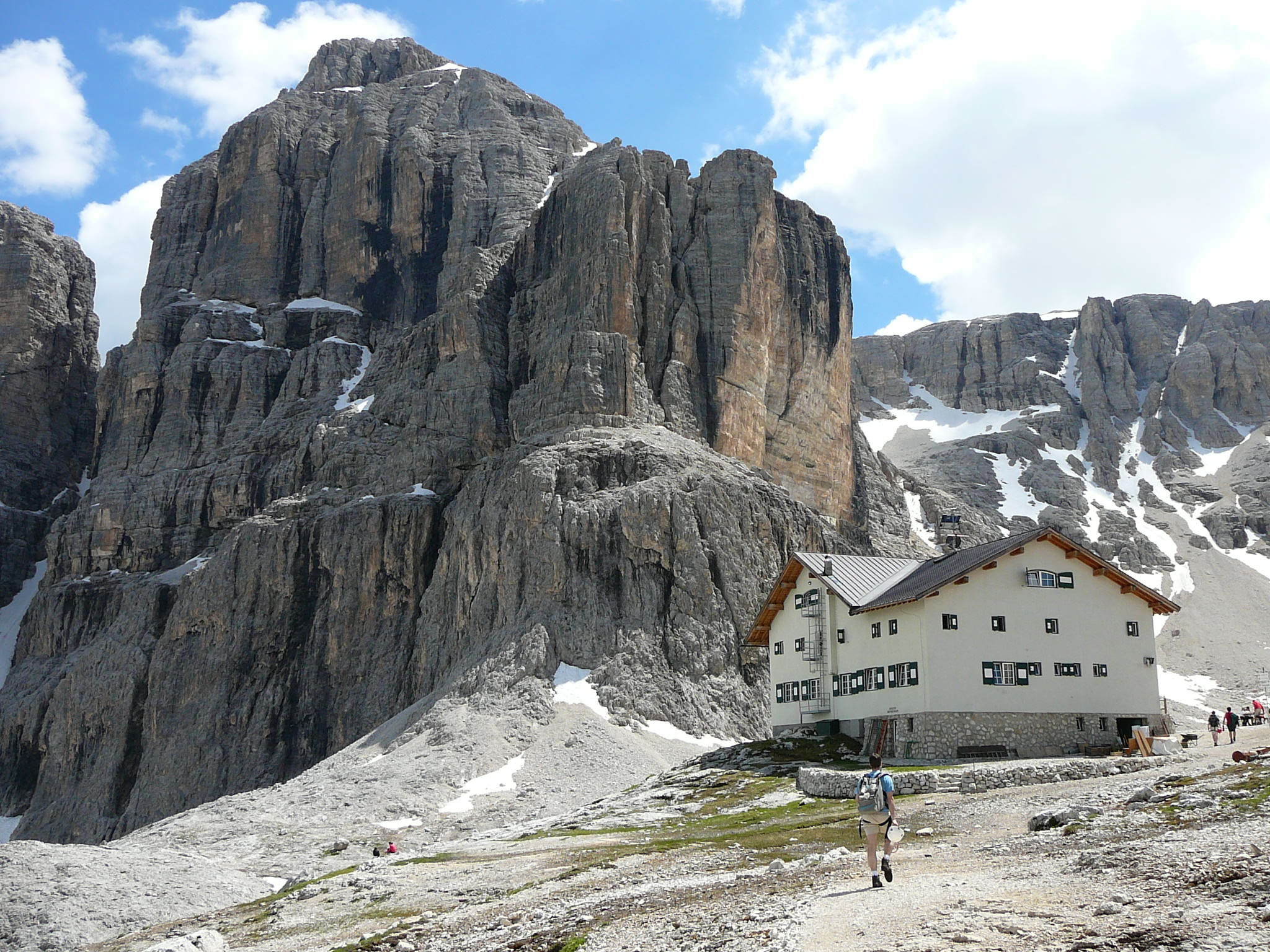 ferrata tridentina, rifugio pisciadù